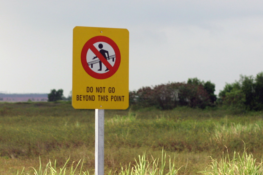 Semakau Scenery